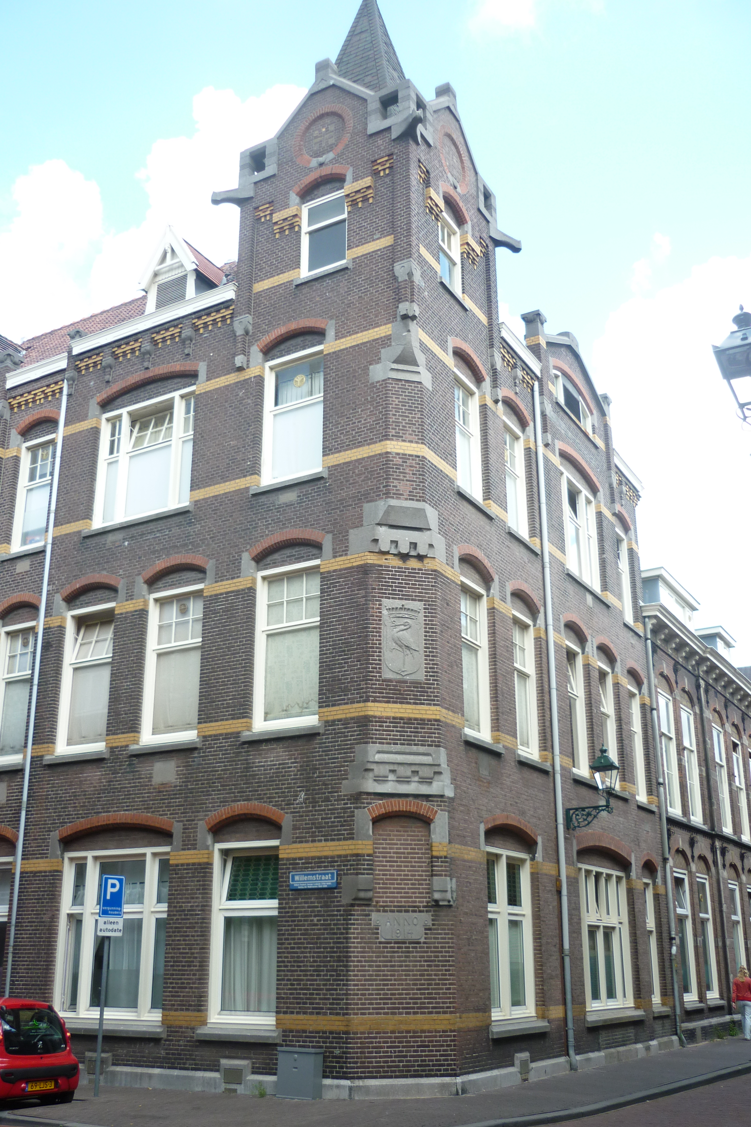 Kazernestraat hoek Willemstraat in Den Haag, voormalig GEB gebouw